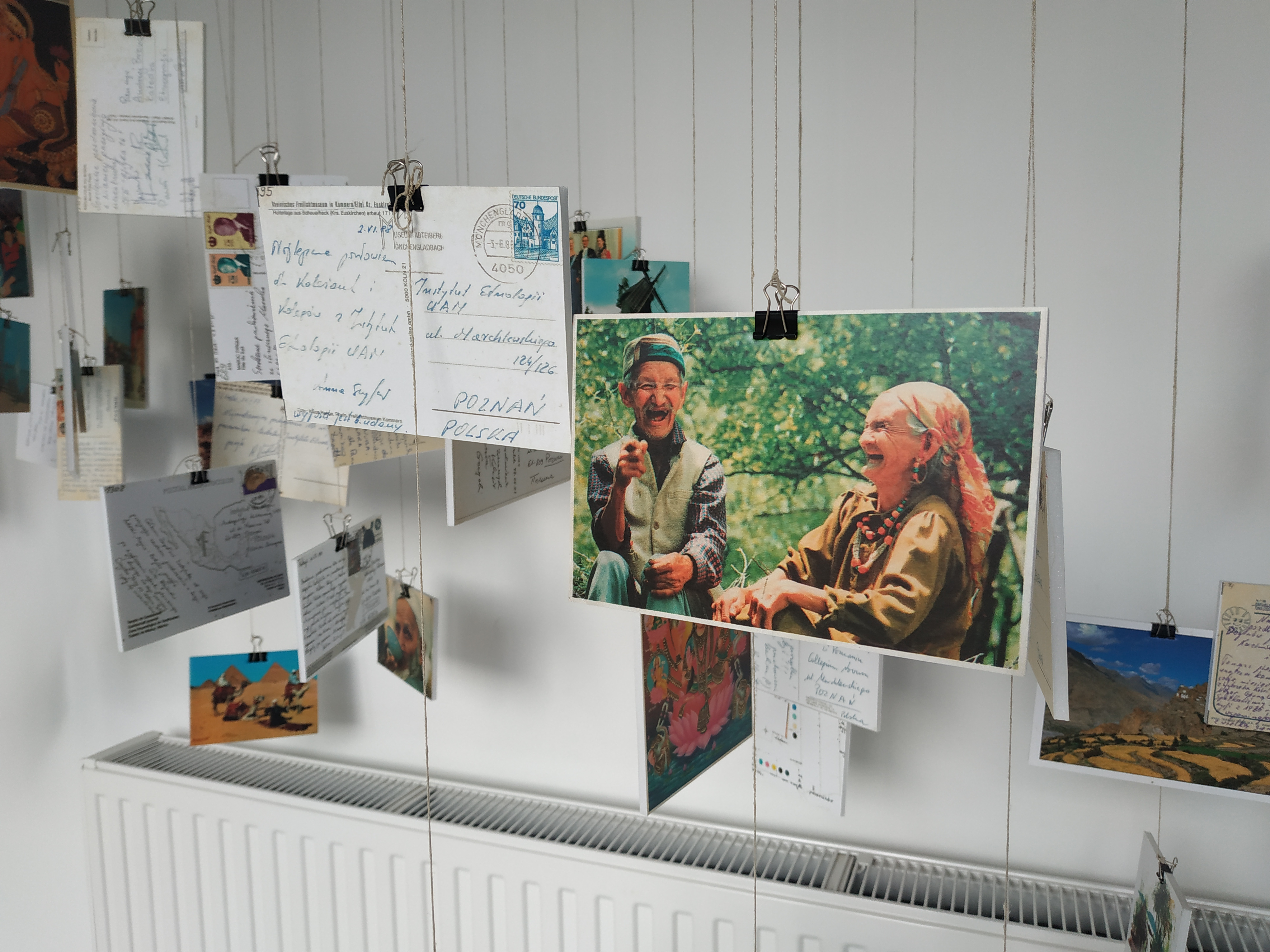 Wystawa zbioru pocztówek wysyłanych przez pracowników, doktorantów i studentów do Instytutu Antropologii i Etnologii UAM w Poznaniu podczas badań terenowych. Pocztówki gromadzone są w instytutowym archiwum.